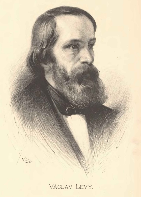 Portréty předních osobností od Jana Vilímka